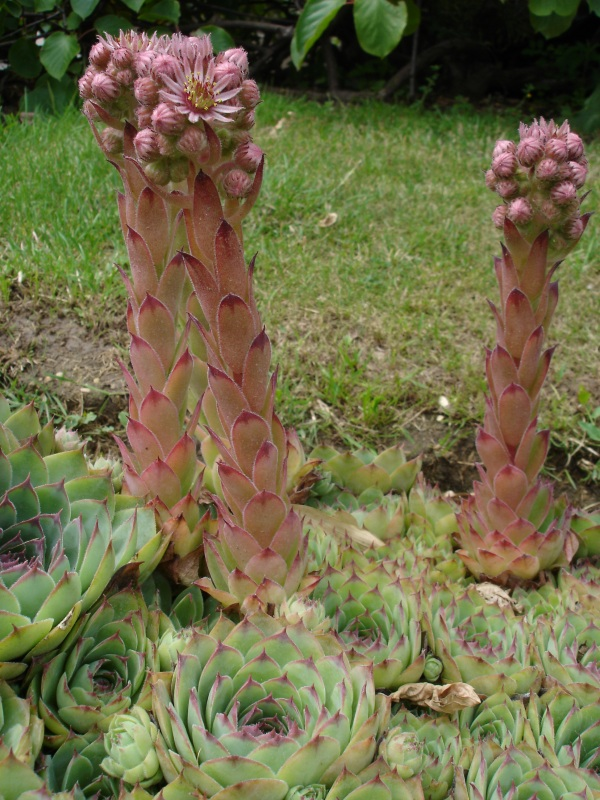 Sempervivum tectorum, 13 juillet 2004, Jardin alpin, Jardin des Plantes de Paris